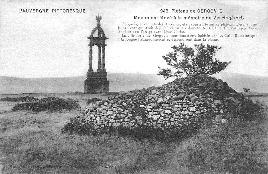 Au premier plan, un des anciens pierriers agricoles du plateau de Gergovie, au fond la silhouette du monument commémoratif à Vercingétorix érigé en 1900 en souvenir de sa victoire sur César de 52 avant J.-C. (la légende de la carte postale est erronée, donnant - 49 avant J.-C.).